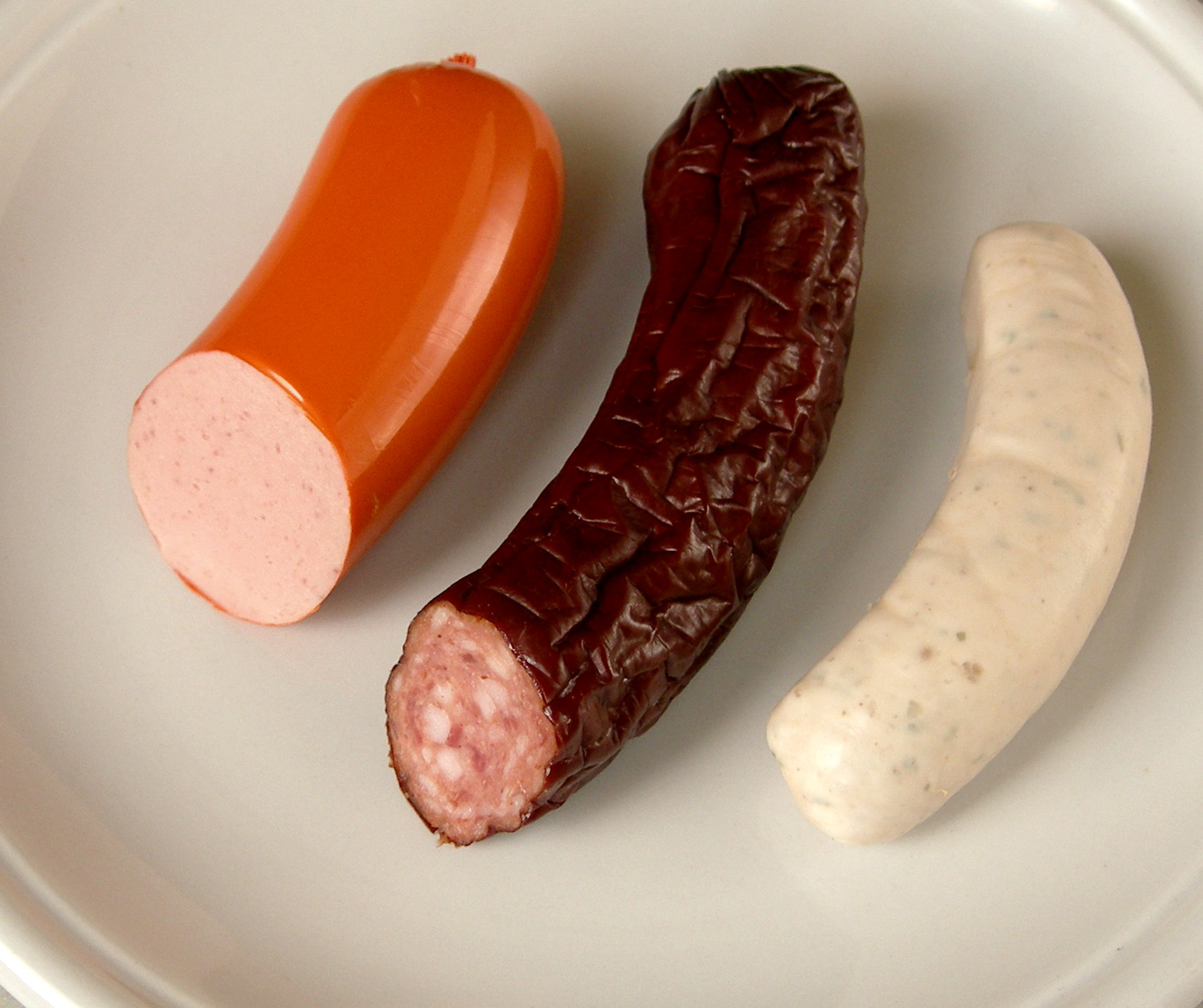 Brühwurst (Verschiedene Brühwürste: Lyoner, österreichische Dauerwurst, Weißwurst)